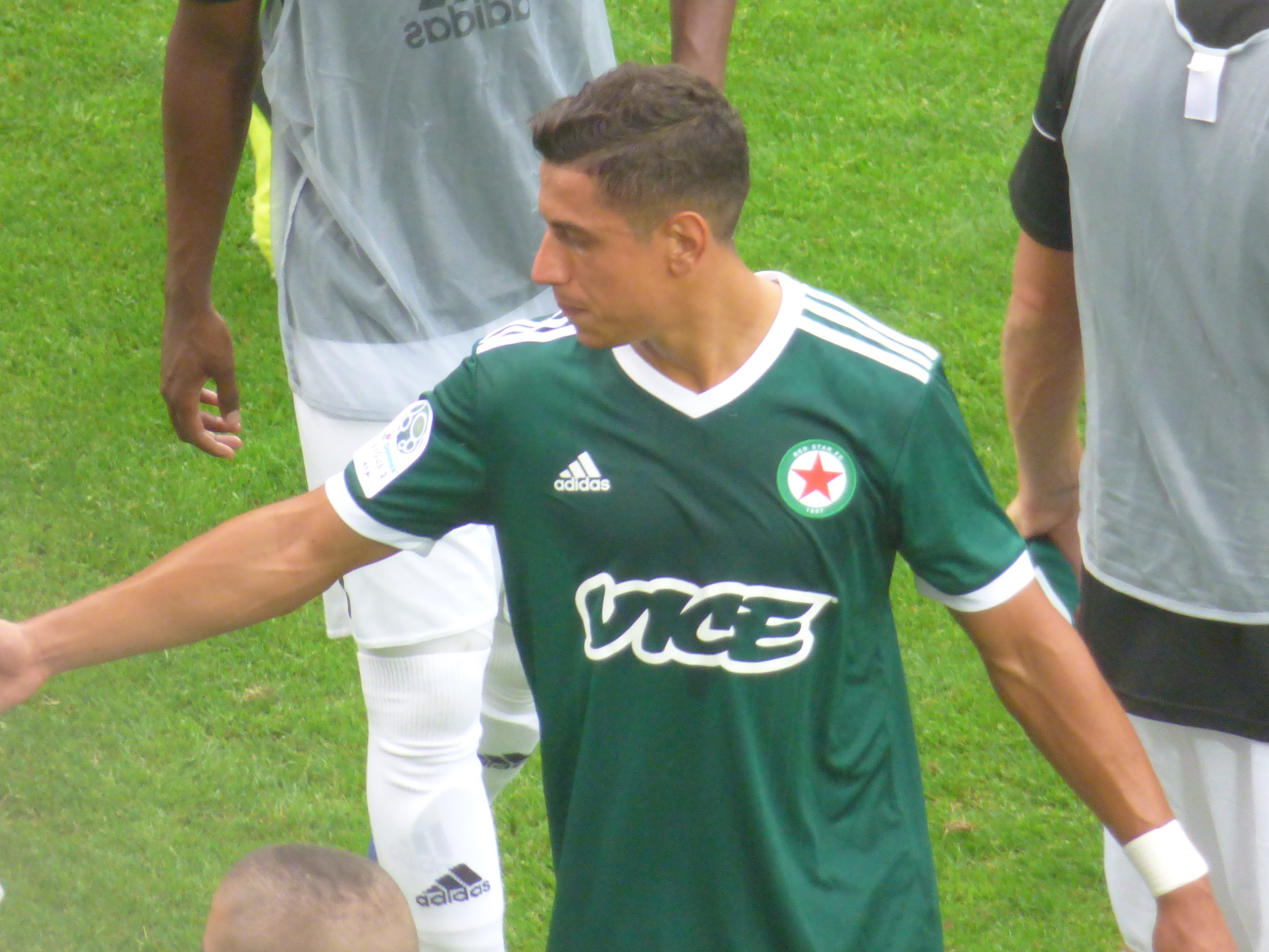 Jordan Faucher après le match RC Lens / Red Star, comptant pour la deuxième journée du championnat de France de Ligue 2 2018-2019 au Stade Bollaert-Delelis, le 4 août 2018.